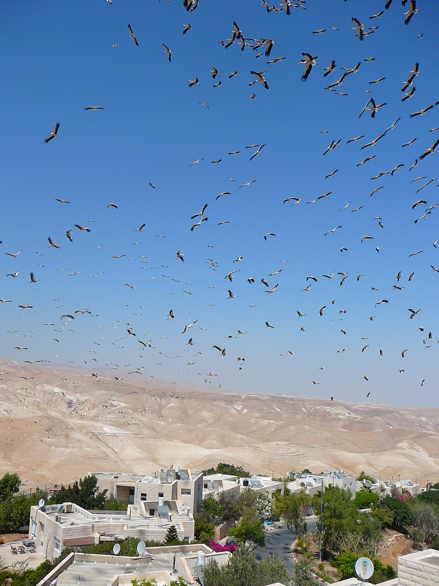 התמונה צולמה מהישוב נופי פרת, השוכן על שפת נחל פרת